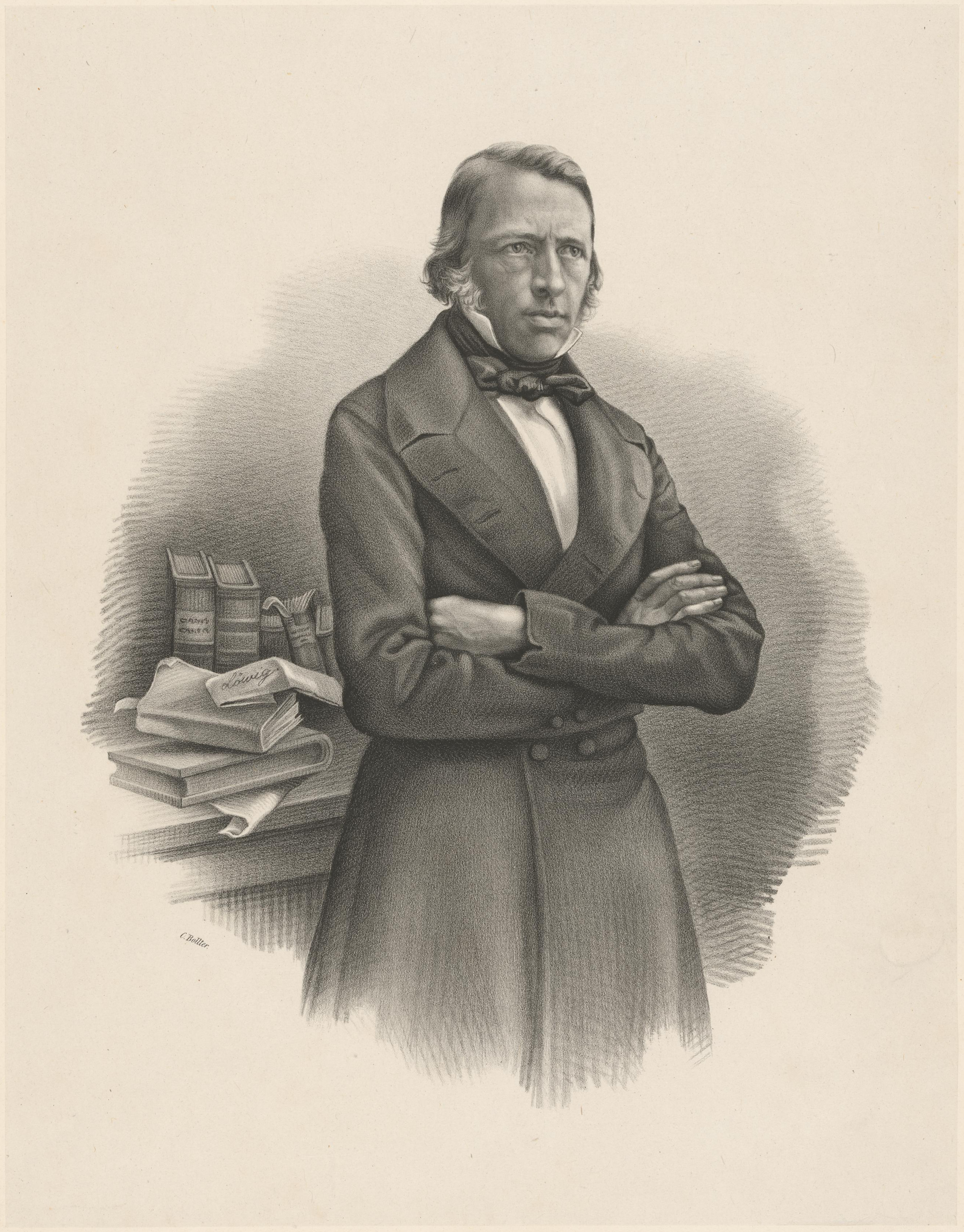 Carl Jacob Loewig (1803–1890)